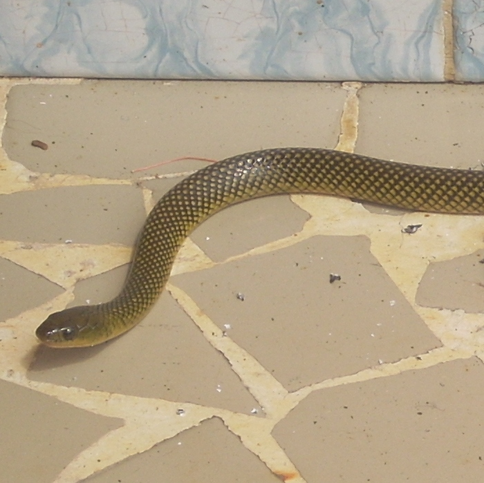 Cobra d'água (Liophis miliaris)